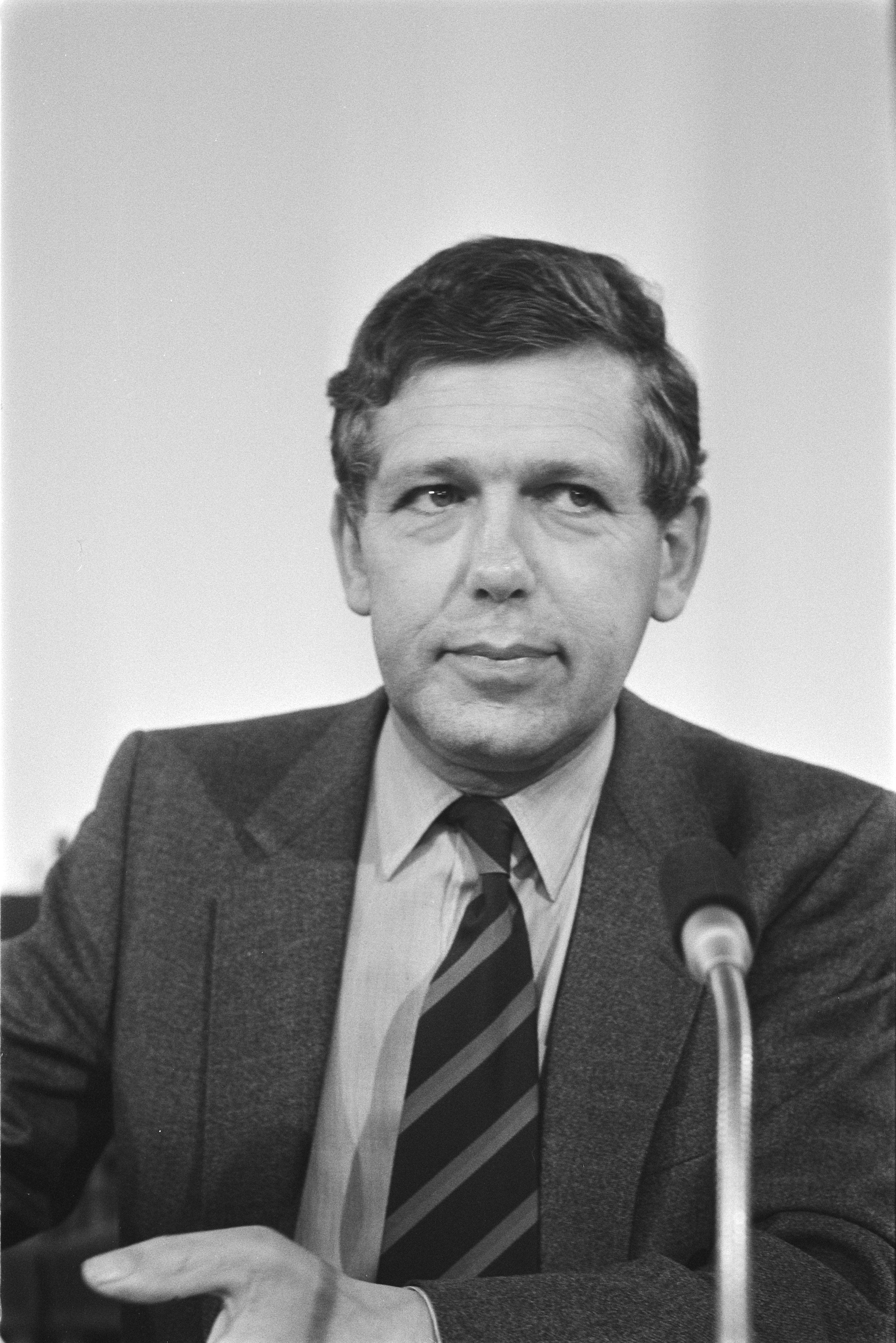 Collectie / Archief : Fotocollectie Anefo Reportage / Serie : [ onbekend ] Beschrijving : RSV-enquete; Jan van Houwelingen Datum : 27 april 1984 Locatie : Den Haag, Zuid-Holland Trefwoorden : parlementaire enquêtes, parlementariërs, politiek, portretten Persoonsnaam : Houwelingen, Jan van Instellingsnaam : RSV Fotograaf : Croes, Rob C. / Anefo Auteursrechthebbende : Nationaal Archief Materiaalsoort : Negatief (zwart/wit) Nummer archiefinventaris : bekijk toegang 2.24.01.05 Bestanddeelnummer : 932-9472